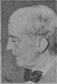 Carl Åkerblad